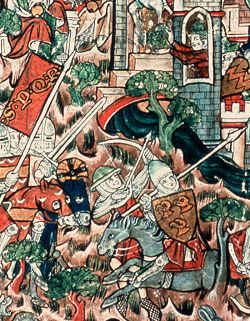 De verwoesting van Jeruzalem. Miniatuur van de verluchter Michiel van der Borch uit een handschrift met Jacob van Maerlants Rijmbijbel.